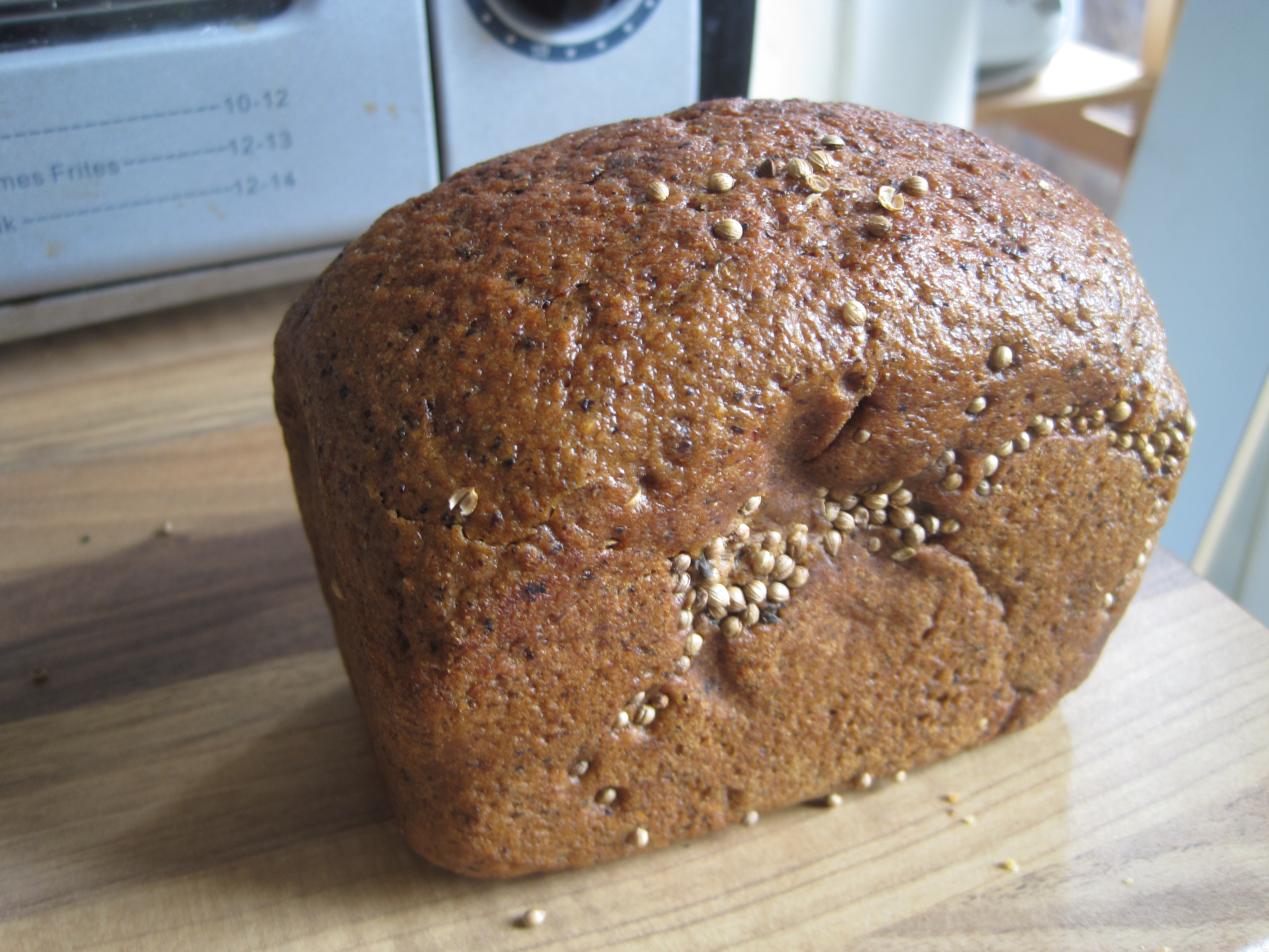 Borodinoer Brot, borordinsky bread, бородинский хлеб II